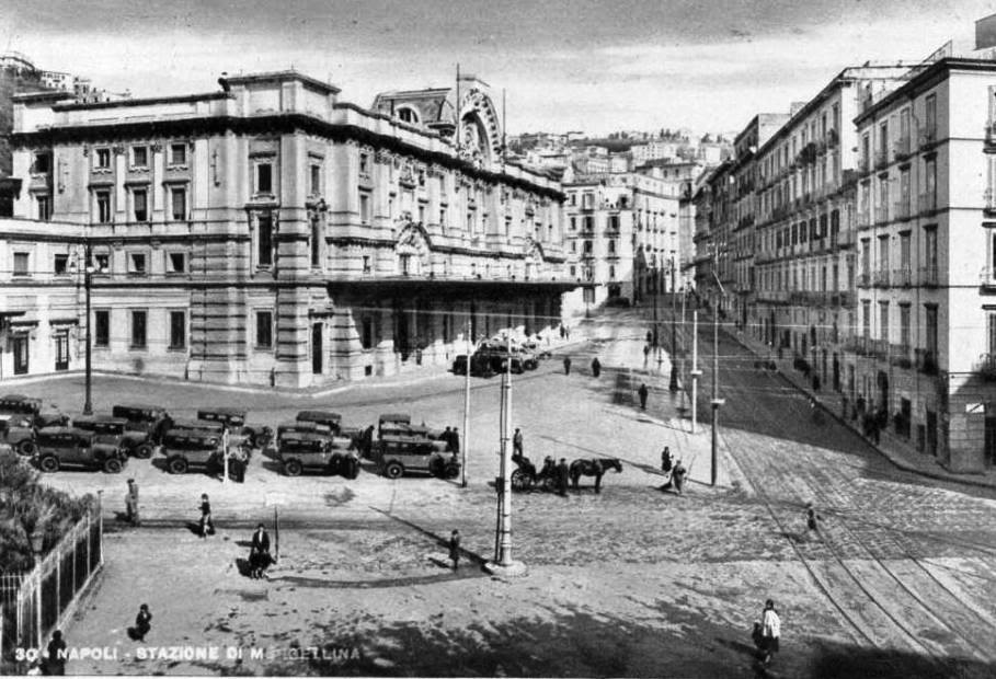 "Napoli - Stazione di Mergellina". Cartolina. Autore sconosciuto. Catalogo n° 30.